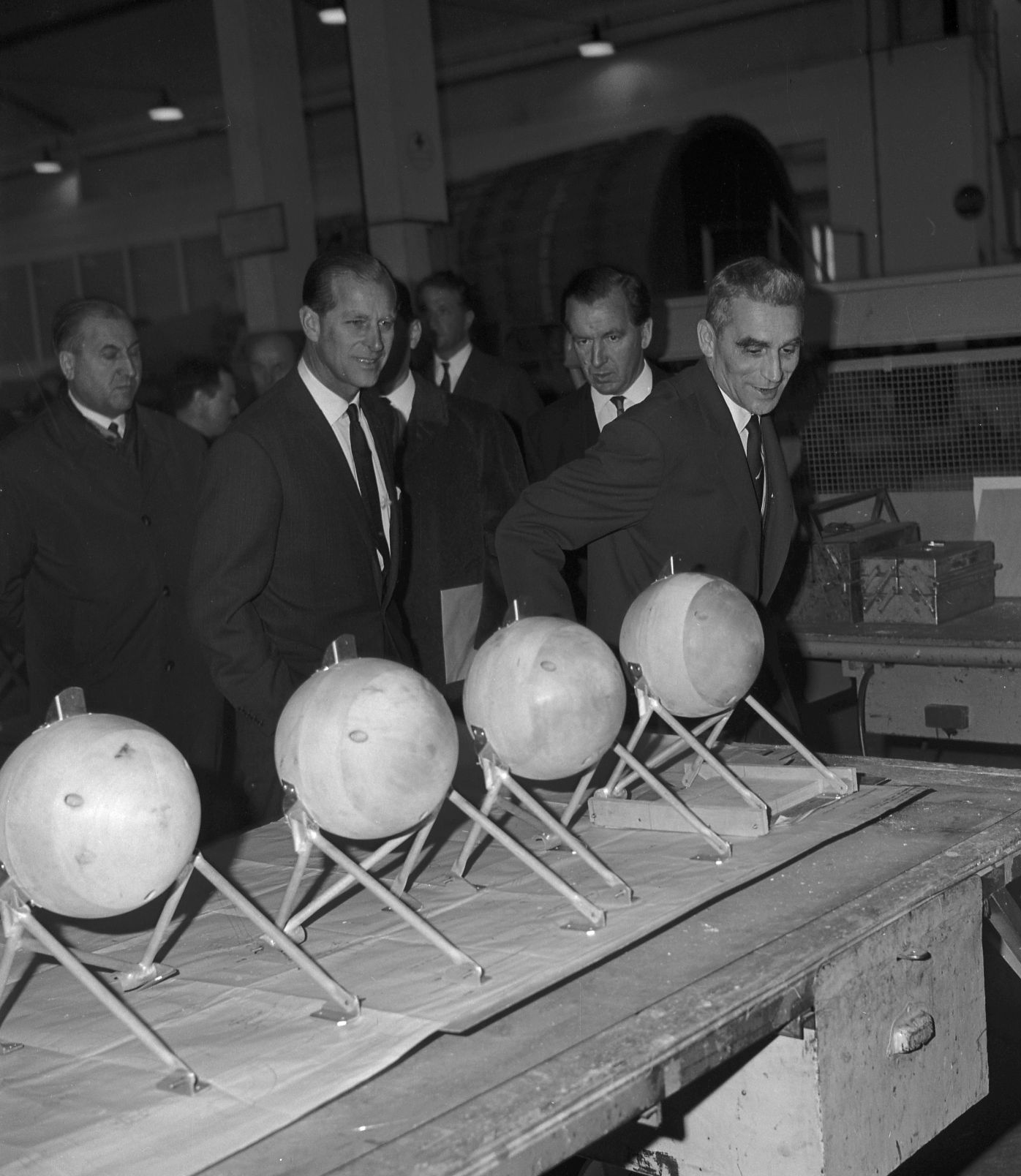 Sud Aviation. 4 et 5 Novembre 1965. Vue du prince Philip d'Angleterre et de Monsieur Servanty en visite dans un hangar.